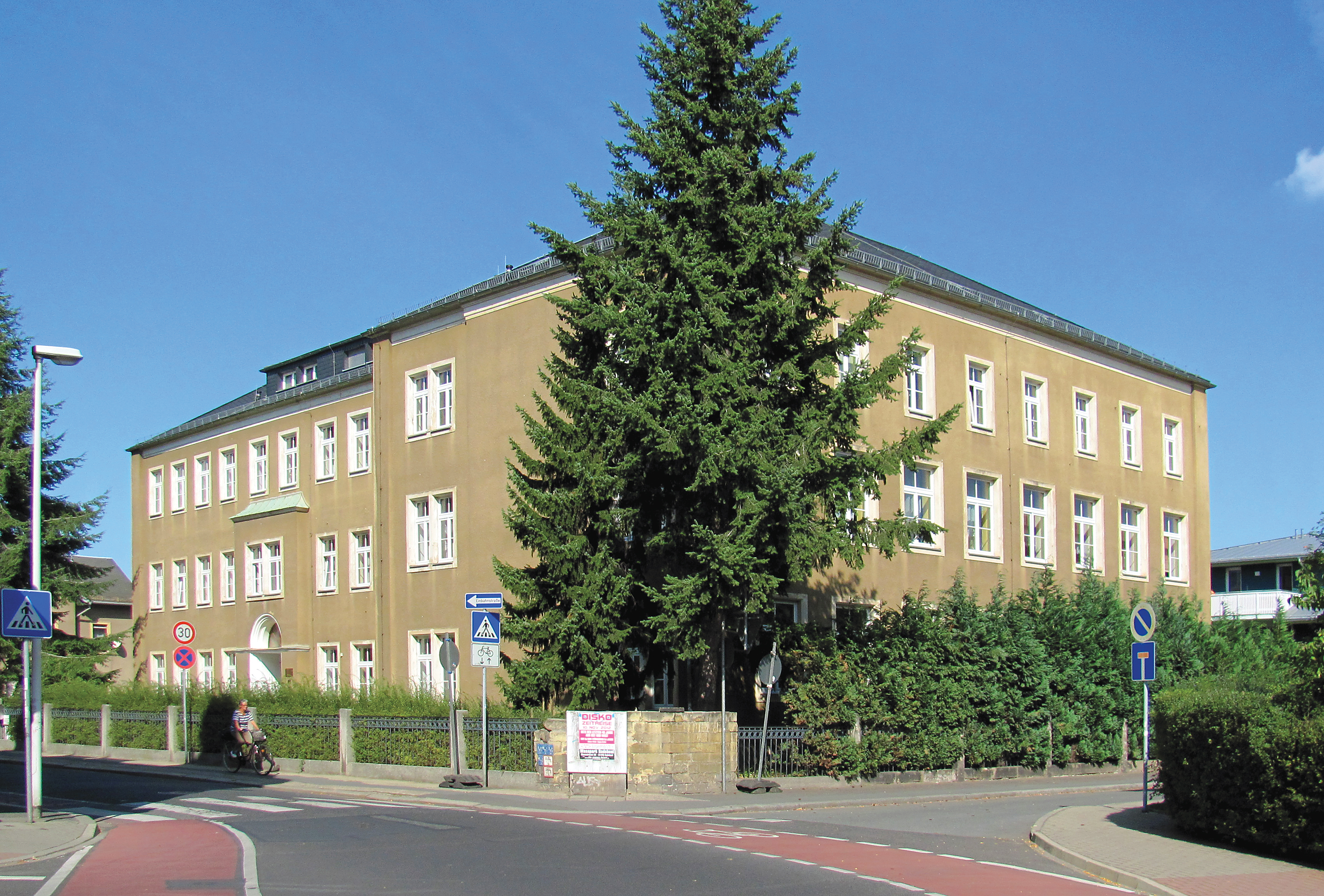 Radebeul, Mittelschule Kötzschenbroda